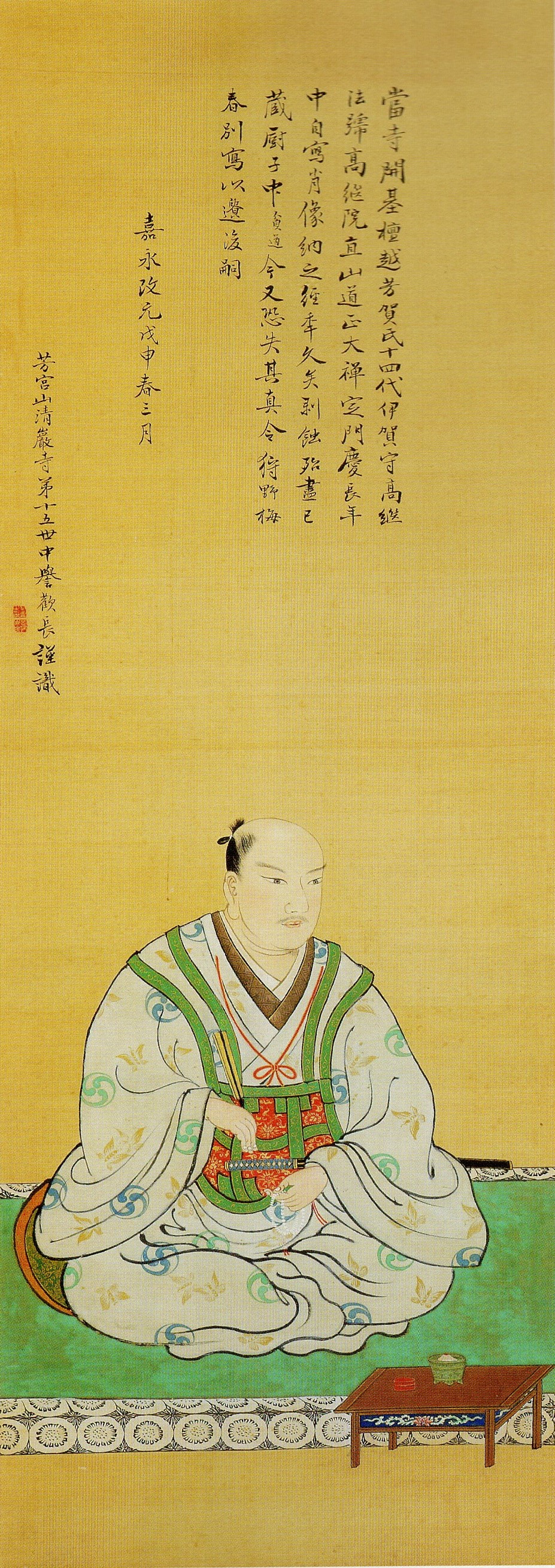 芳賀高継の肖像画。